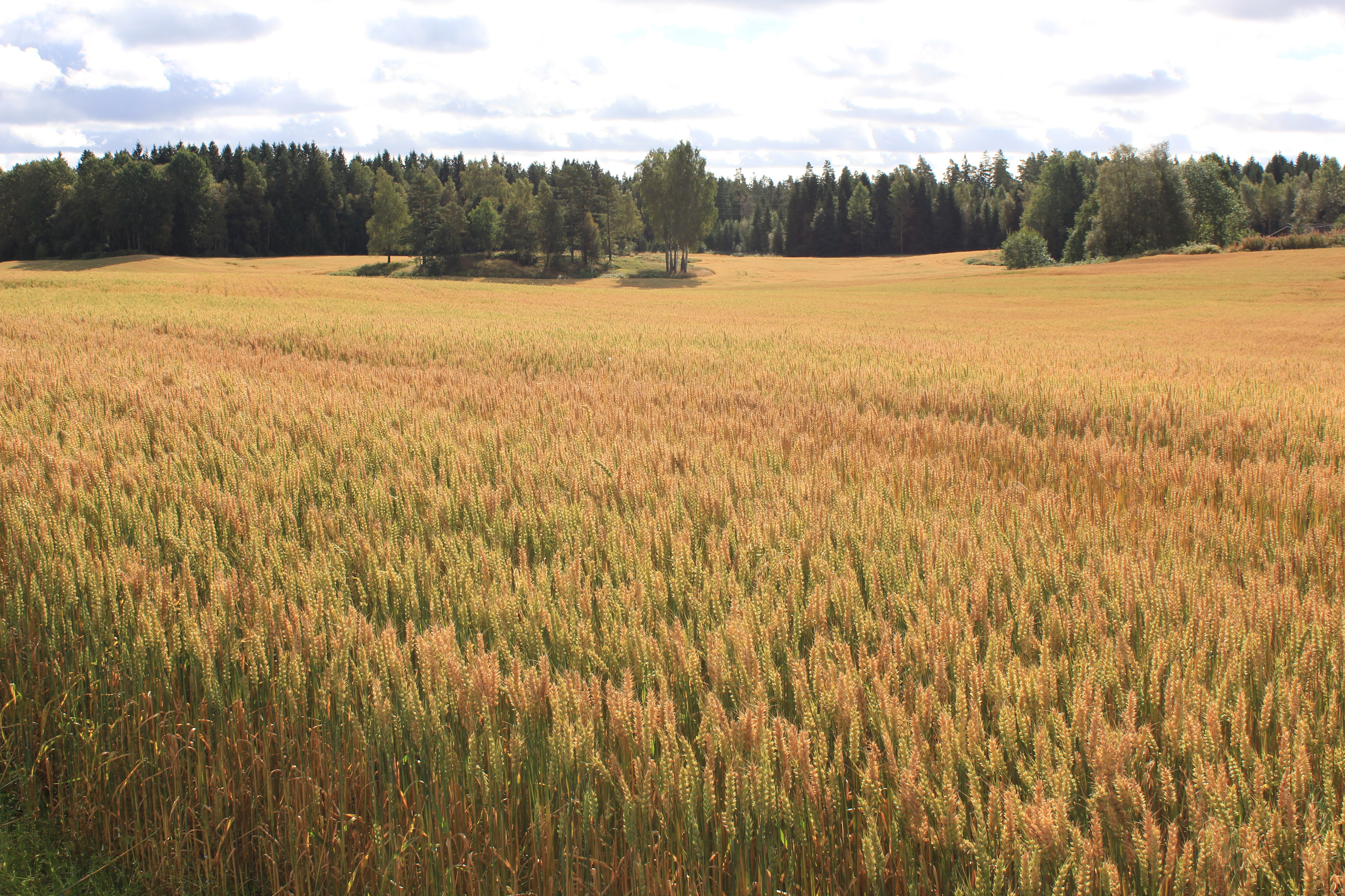 Hveteåker i Akershus. Norsk hvete. Hvetekorn.